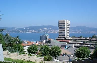 Edificio da Cámara Municipal de Vigo, Galiza, España